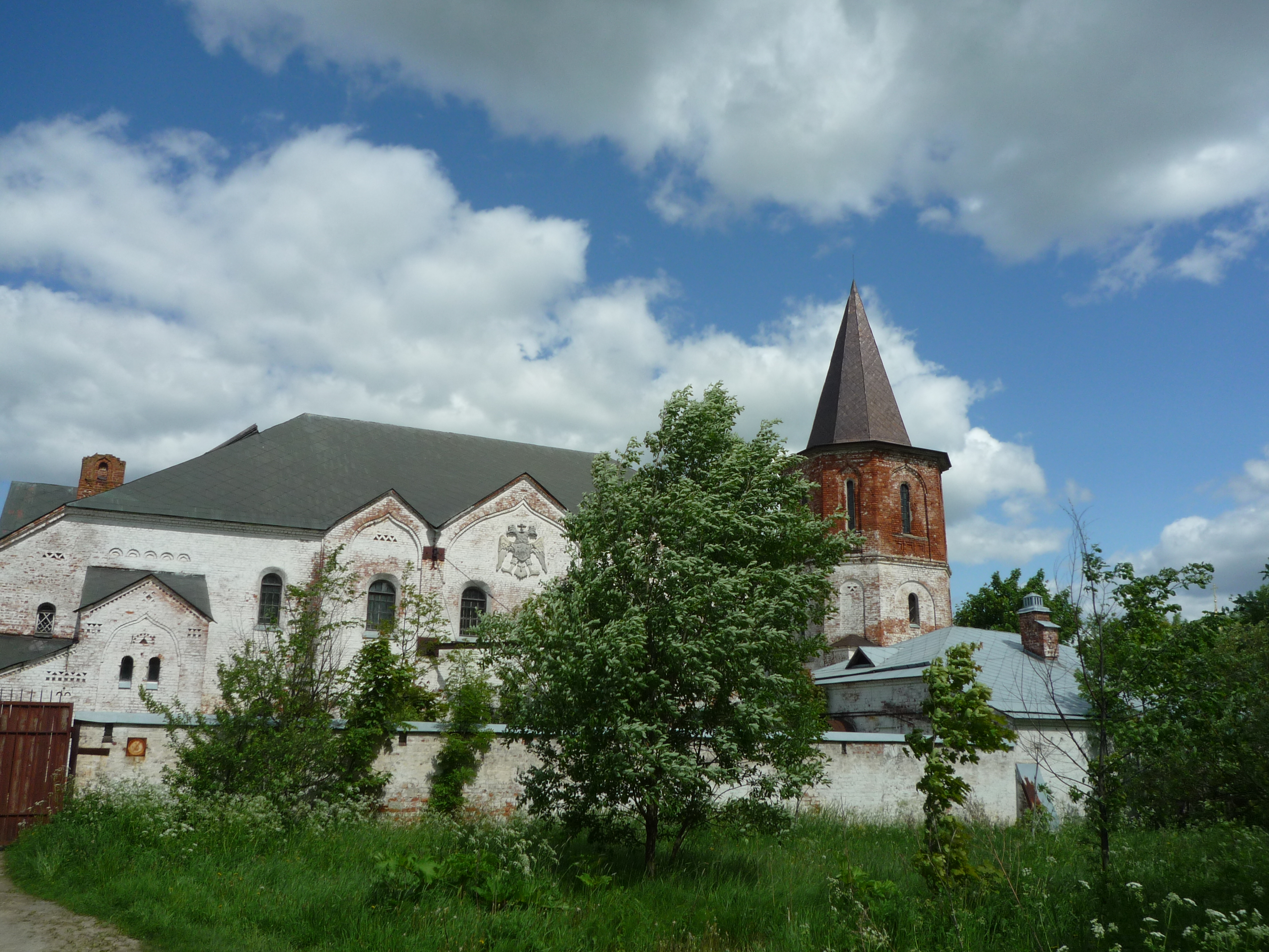 Lumix DMC-FX37